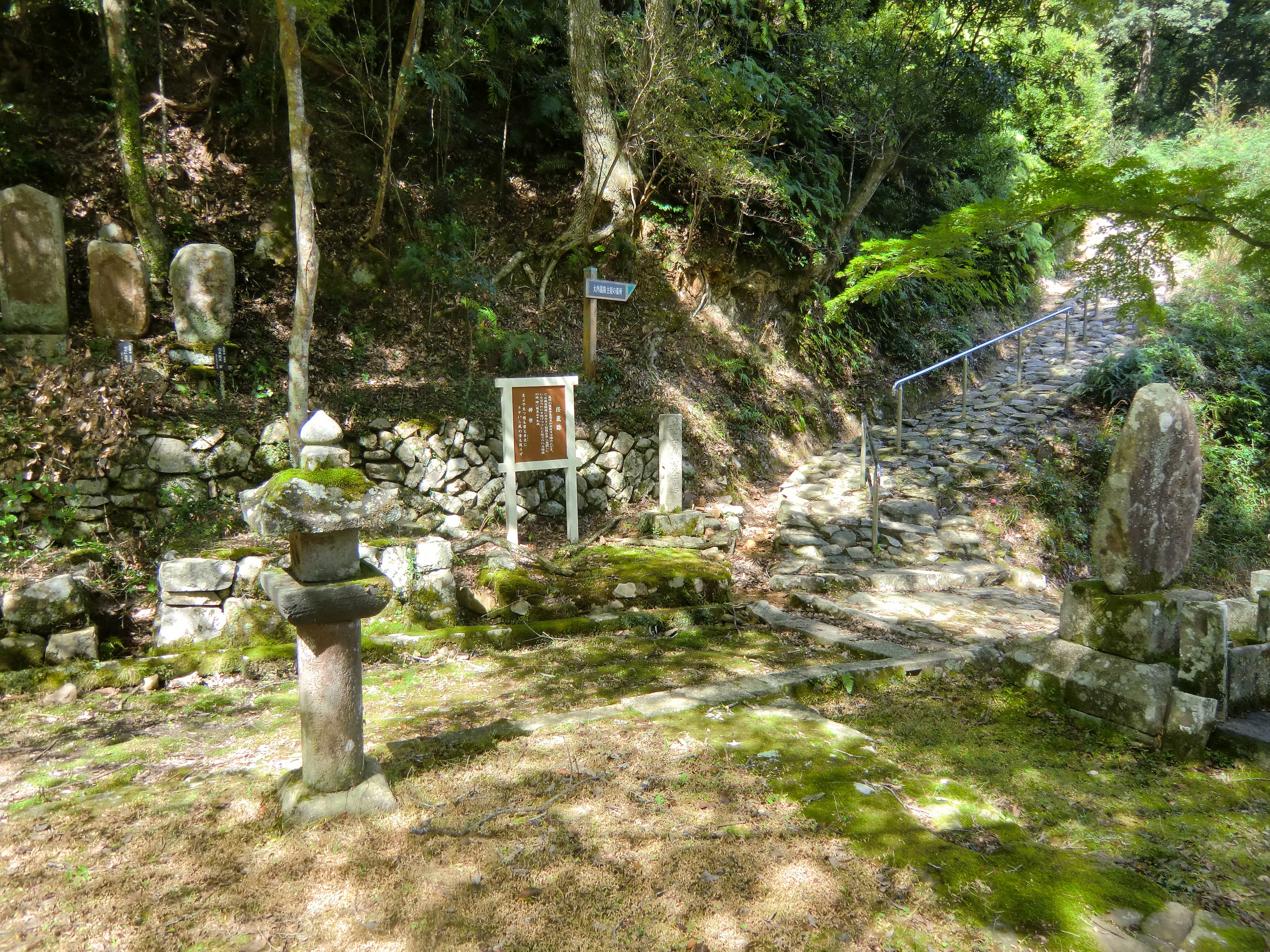 大寧寺の経蔵跡（山口県長門市）